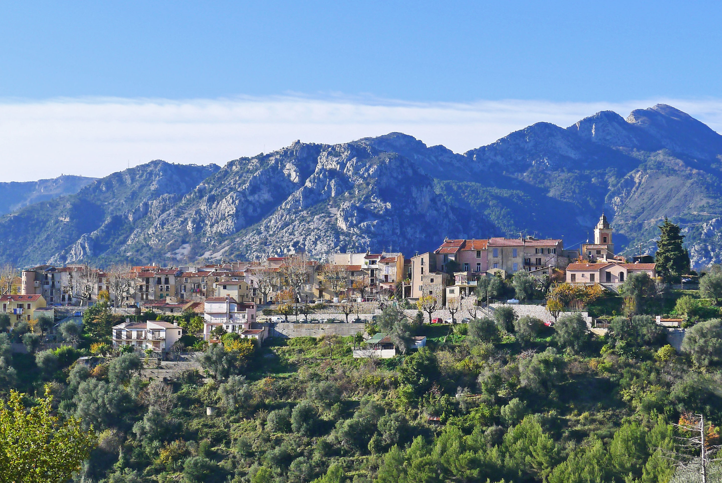 Vue du village de Castellar depuis la route des Granges Saint-Paul